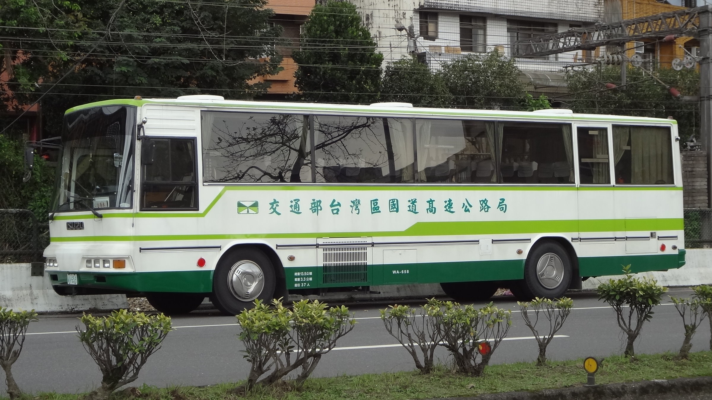 中華民國交通部臺灣區國道高速公路局公務車WA-658左前方外觀。